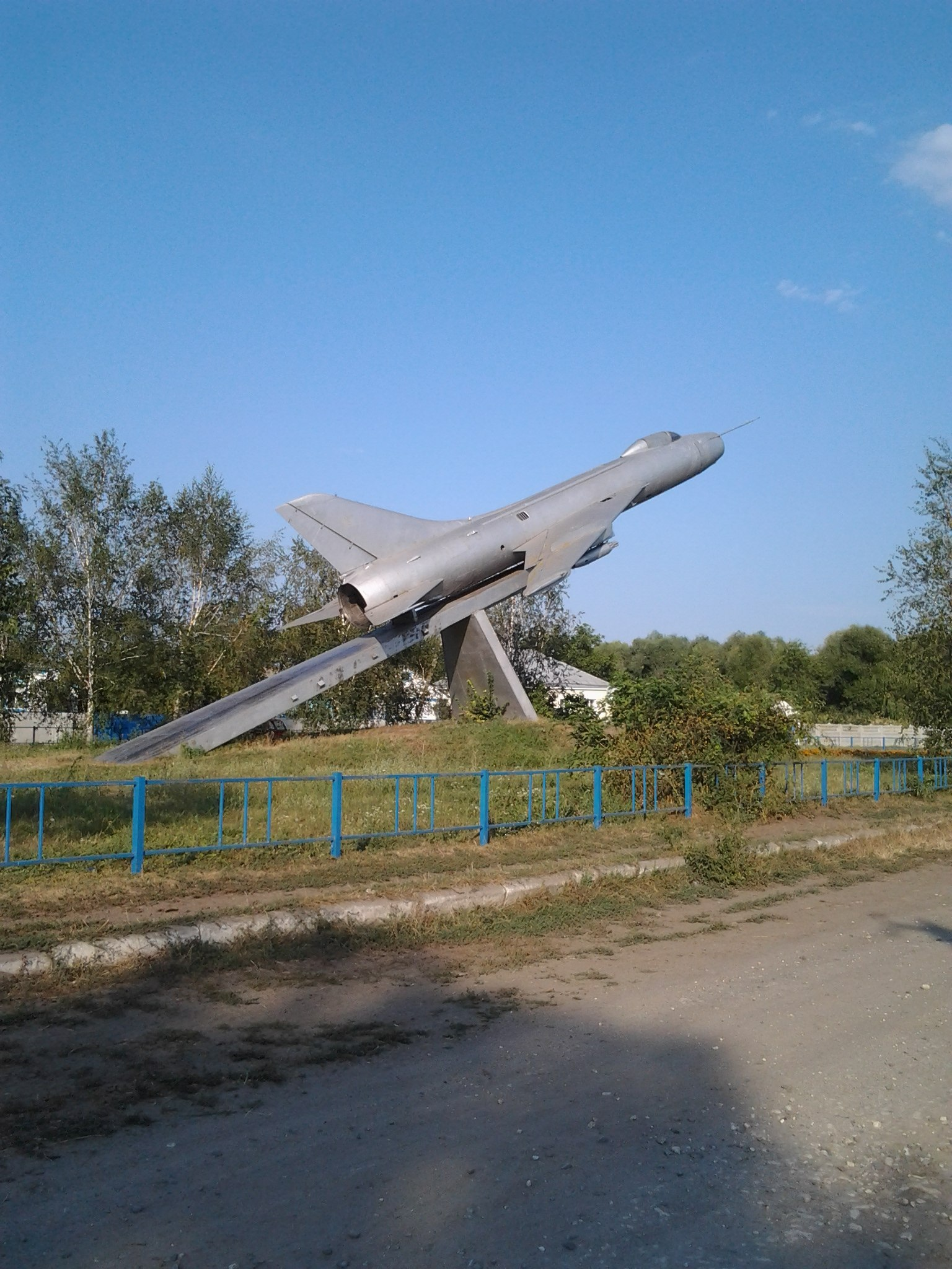 Пам'ятник льотчику І.Н. Степаненко, Двічі Герою Радянського Союзу, встановлений в його рідному с. Нехайки, Драбівський р-н, Черкаська обл., Україна